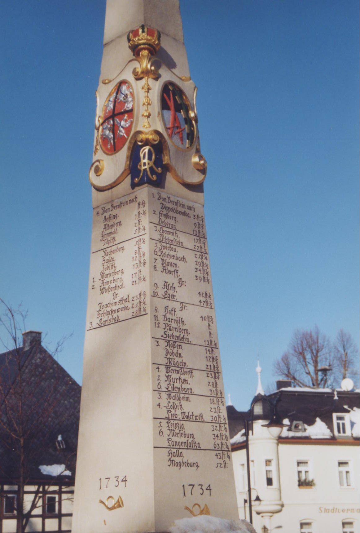 Bärenstein (Osterzgebirge): Postmeilensäule am Markt